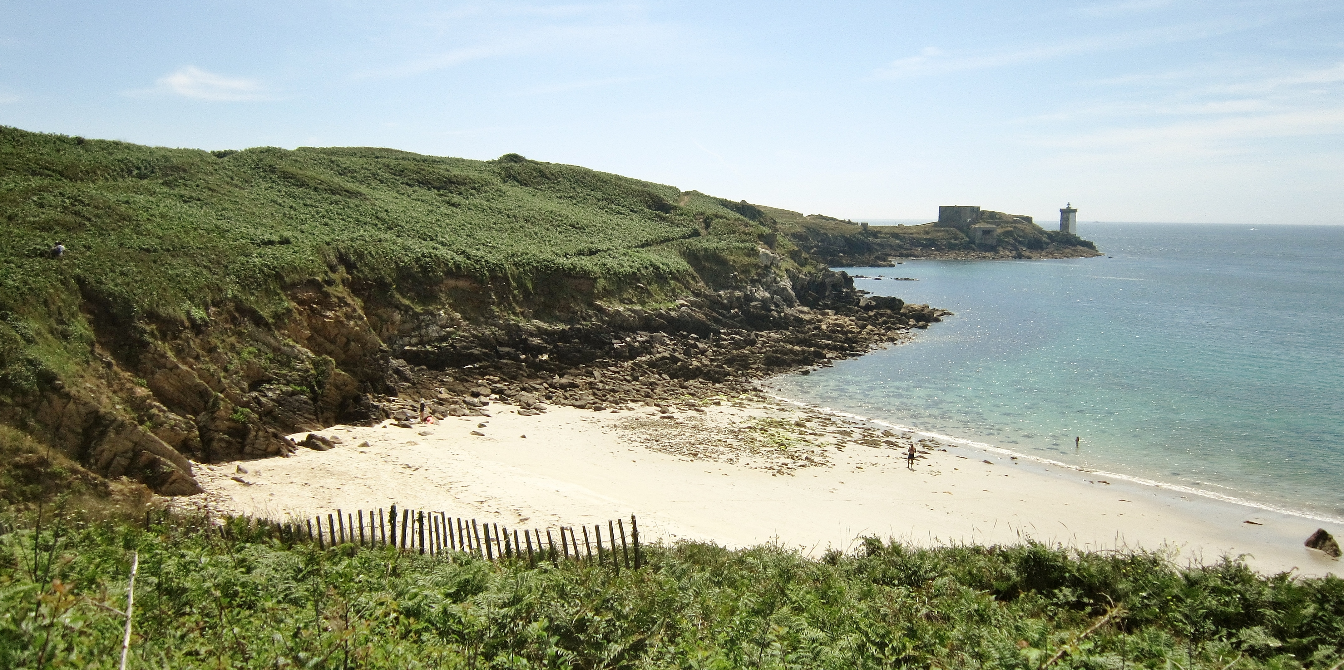 Presqu'île de Kermorvan : la plage de Porz Pabu (c'est là qu'aurait débarqué saint Pabu) ; en arrière-plan la pointe de Kermorvan et le phare de Kermorvan.